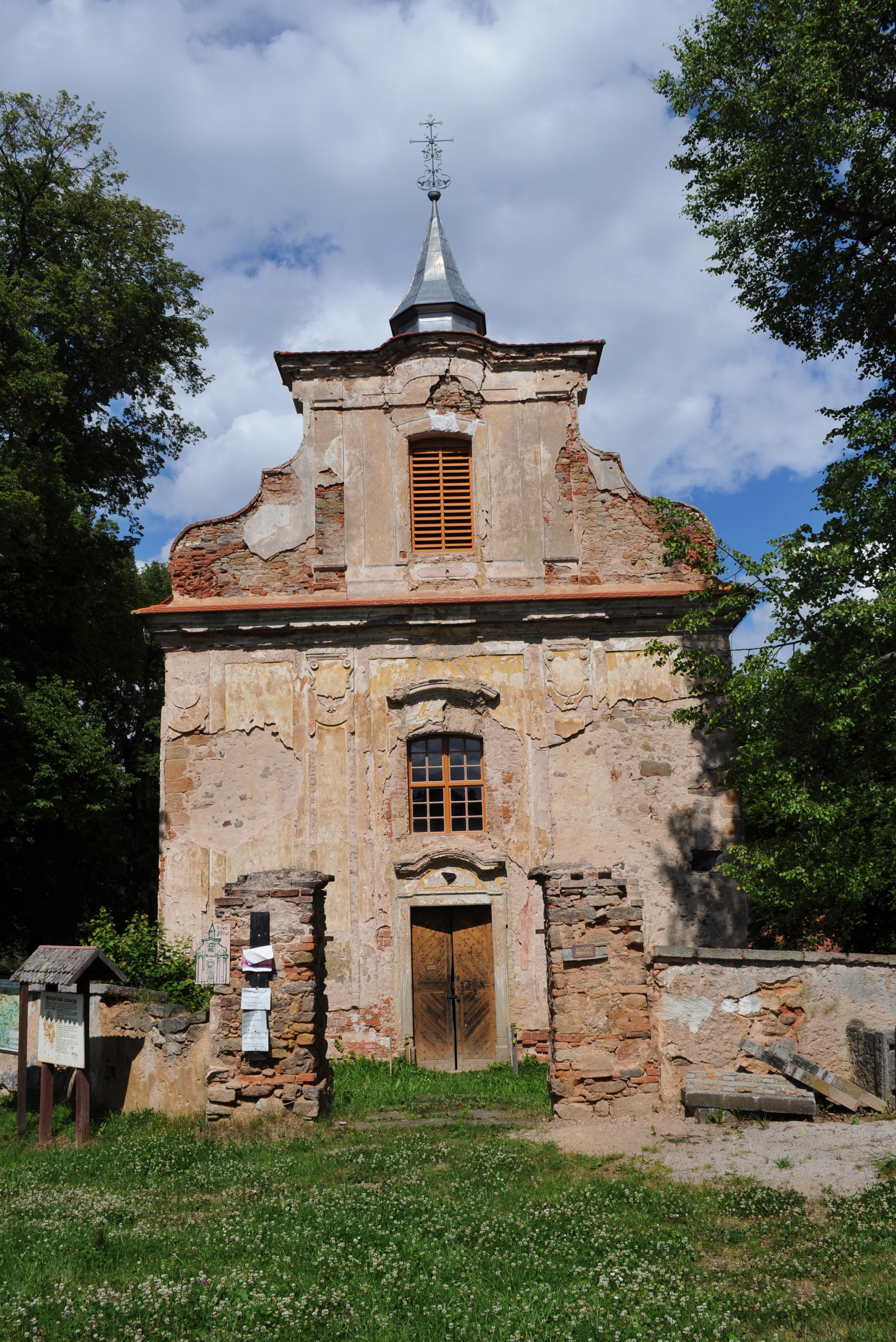 Kostel svatého Jana Křtitele, náves, Ostrovec (Velečín).